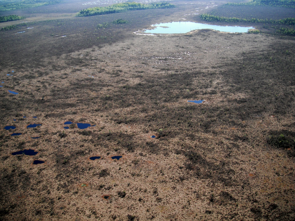 Reiskių ežeras